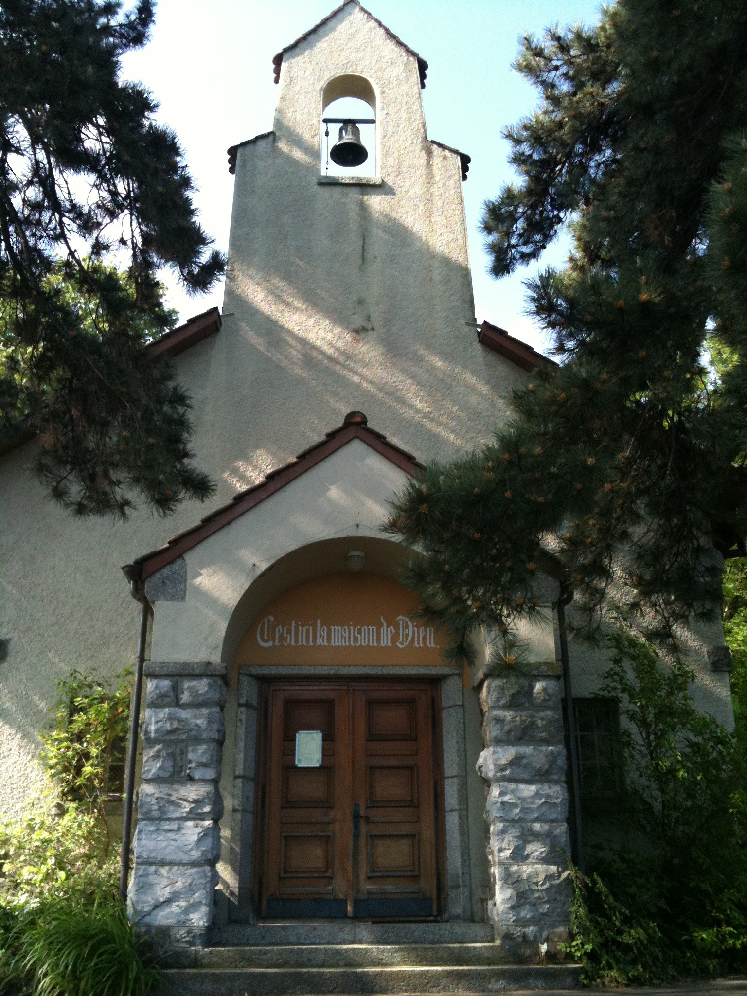 reformierte Kirche Le Bouveret, Kanton Wallis